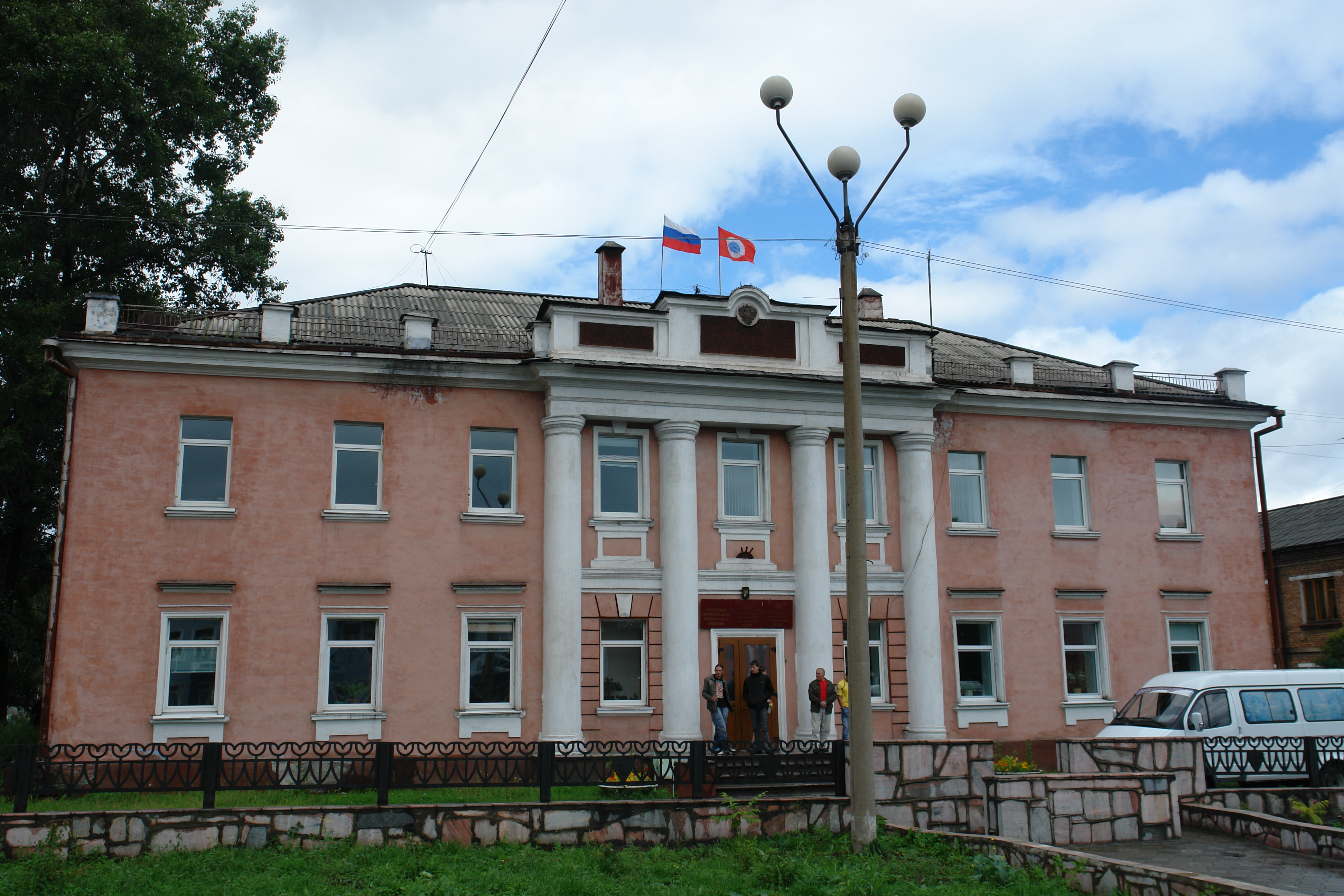 Здание администрации Слюдянки и Слюдянского района